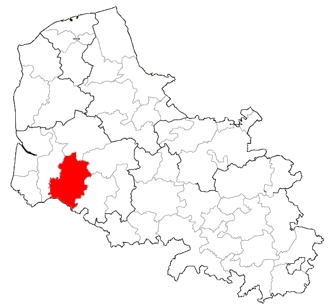 Localisation de la CCVCA dans le Pas-de-Calais.